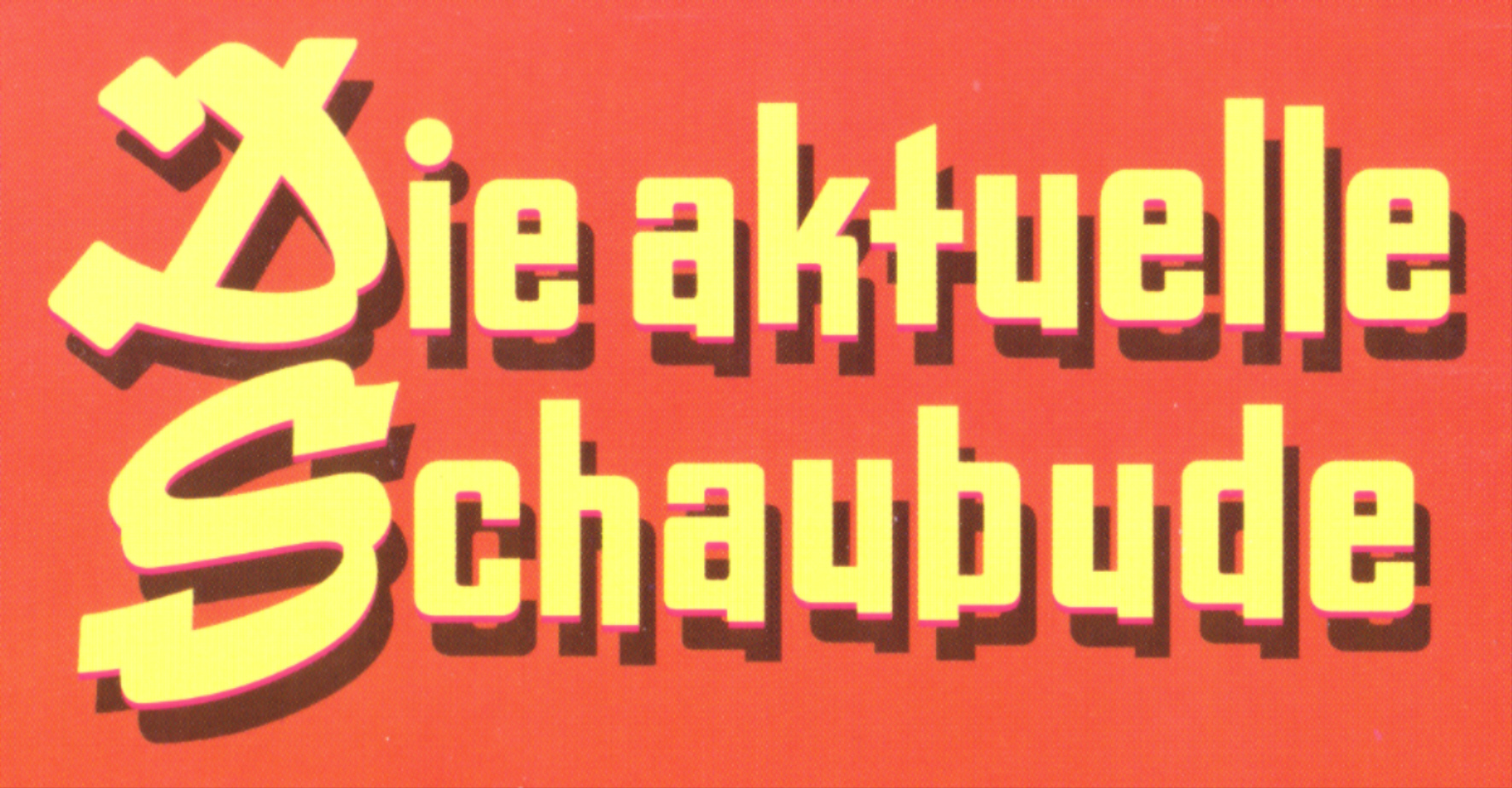 Logo der Fernsehsendung Aktuelle Schaubude von 1957 bis 2002